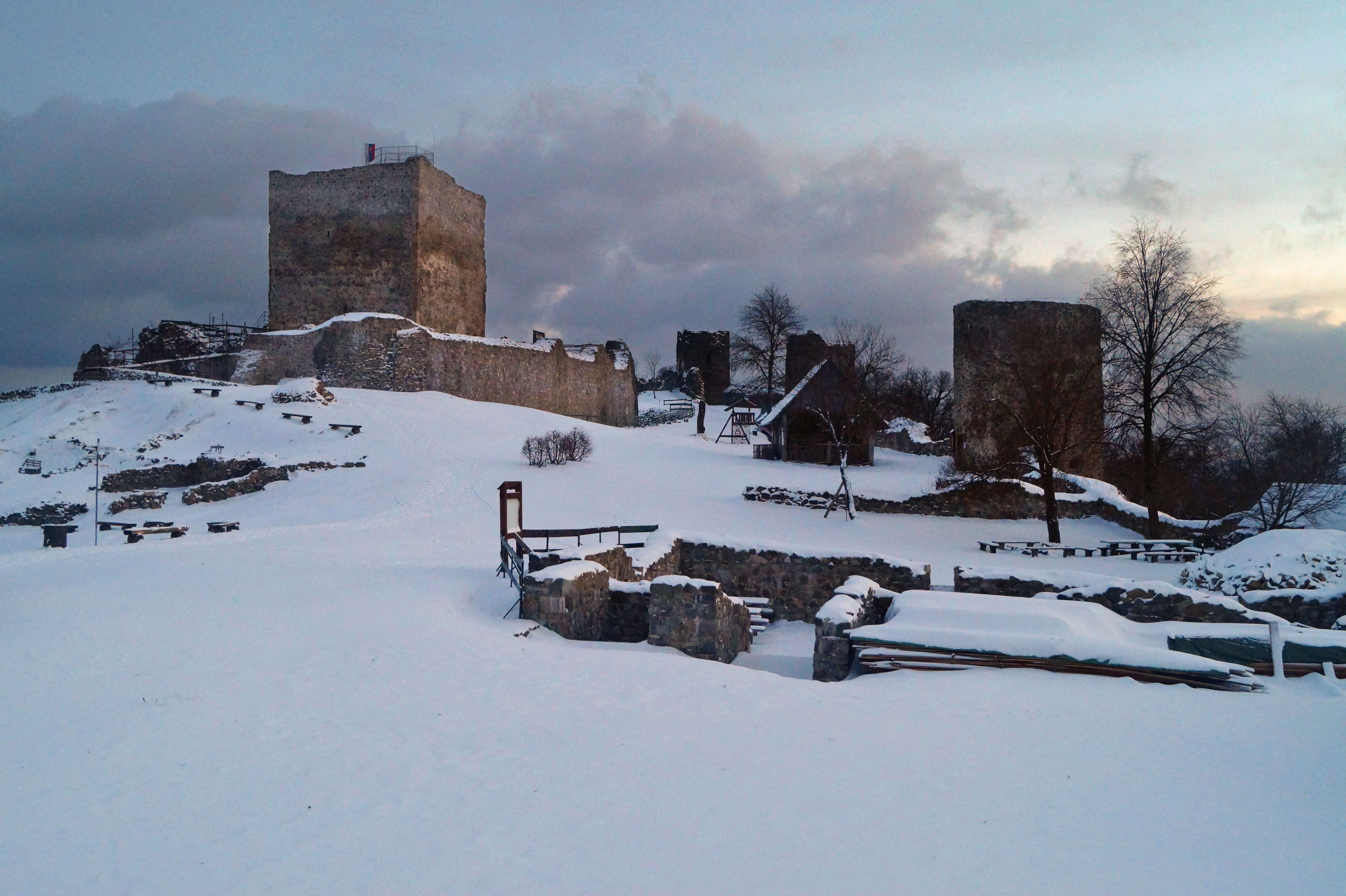 Areál Šarišského hradu v zime